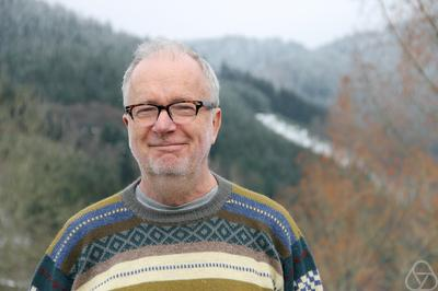 Foto di Bo Berndtsson